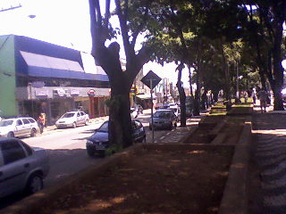 Essa imagem mostra a avenida José Paulino, principal avenida do centro da cidade brasileira de Paulínia, localizada no estado de São Paulo. O trecho representado corresponde à avenida próximo à Praça São Bento.